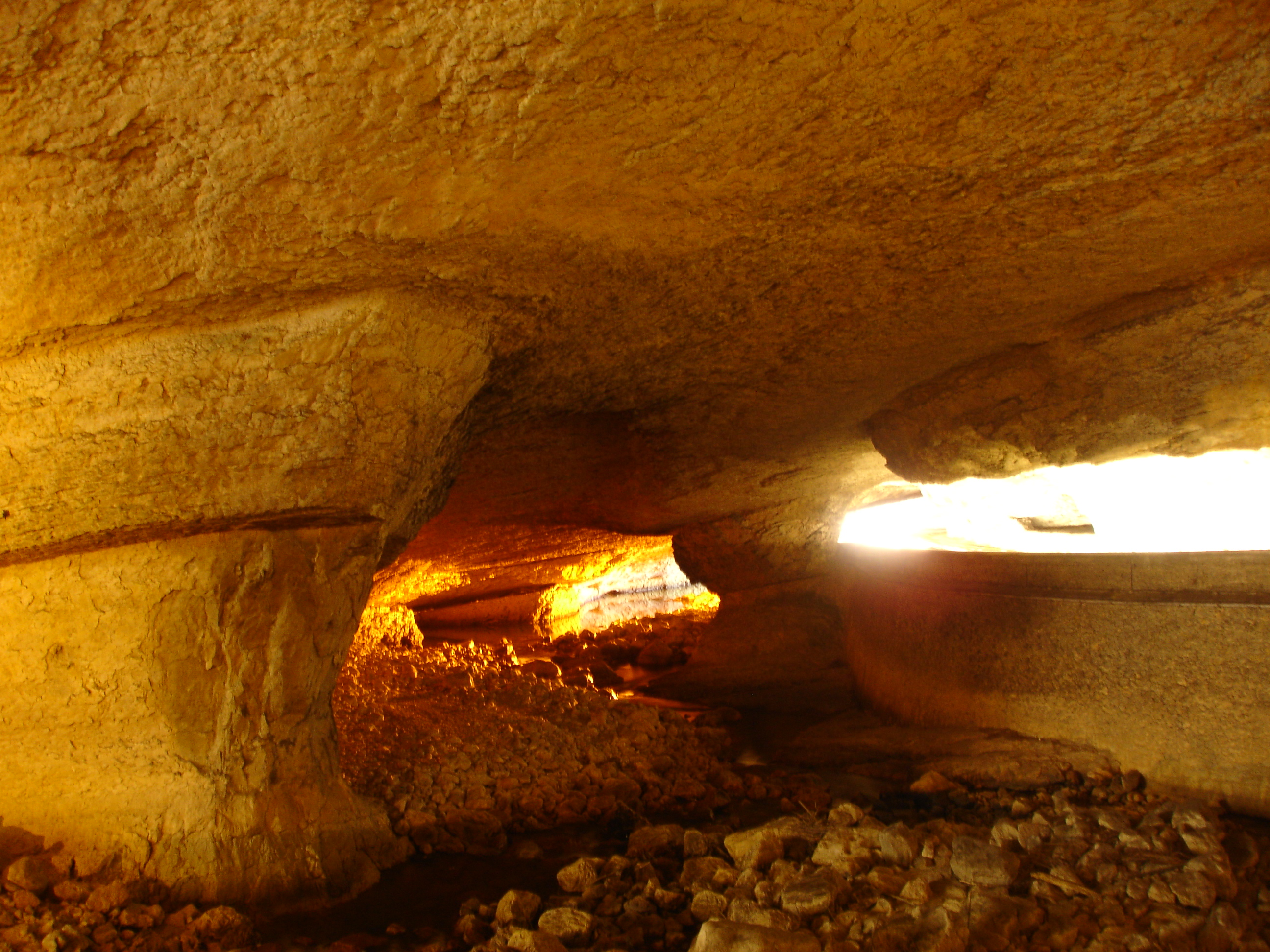 Grotte du Mas d'Azil, Ariège (09), France